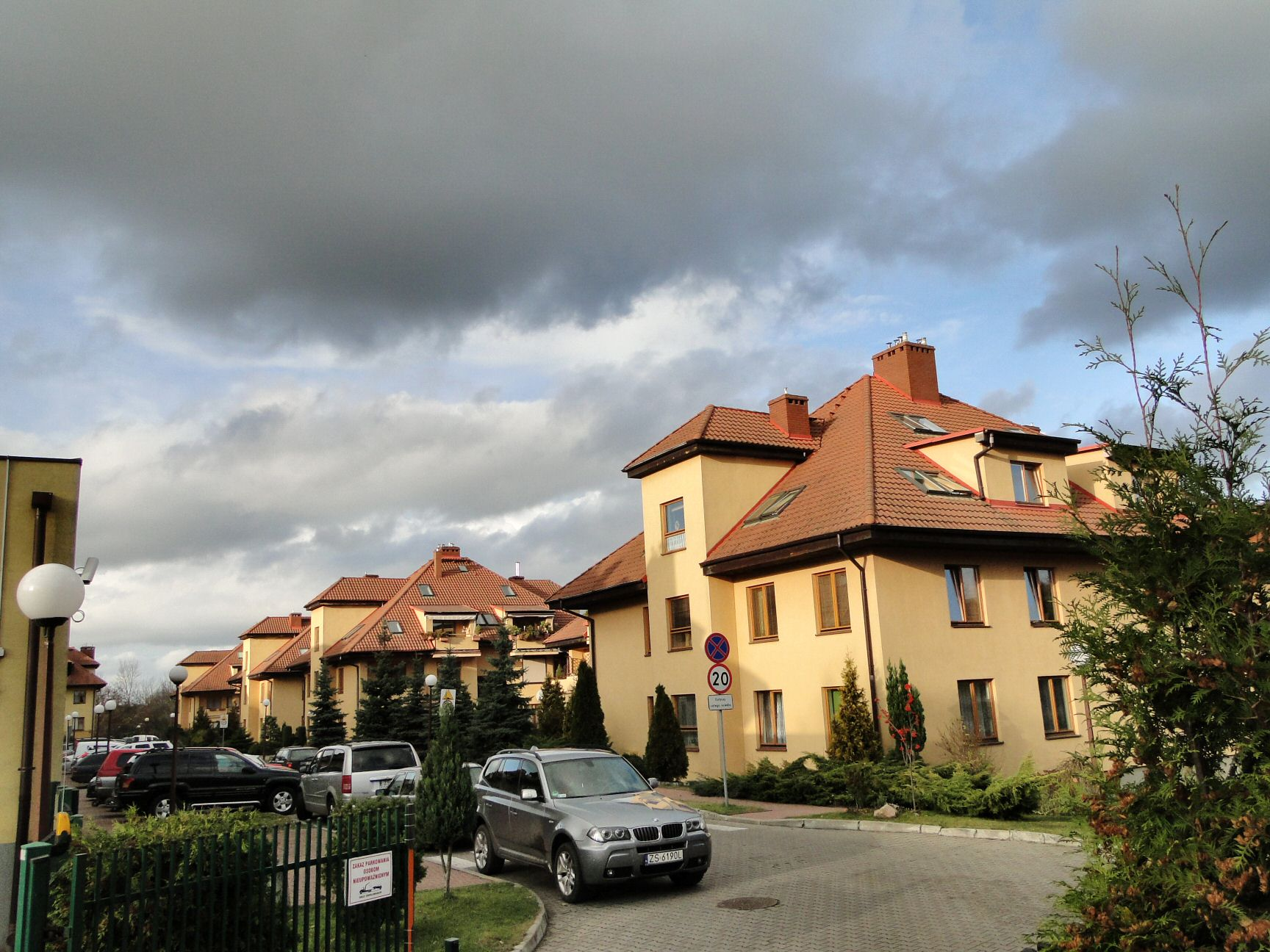 Osiedle Pod Kasztanami I w Szczecinie